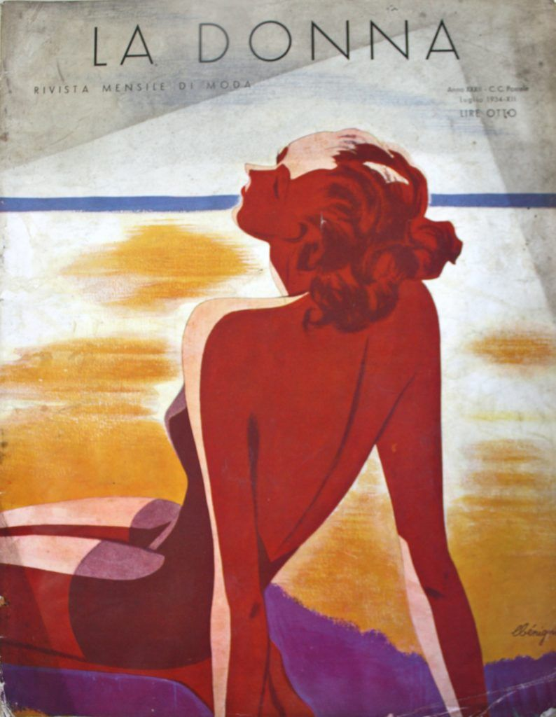 Titelblatt mit der Künstlersignatur des französischen Malers, Grafikers und Mode-Illustrator Léon Bénigni aus dem Jahr 1934 der in Turin herausgegebenen, erstmals 1905 erschienenen italienischen Zeitschrift La Donna ...